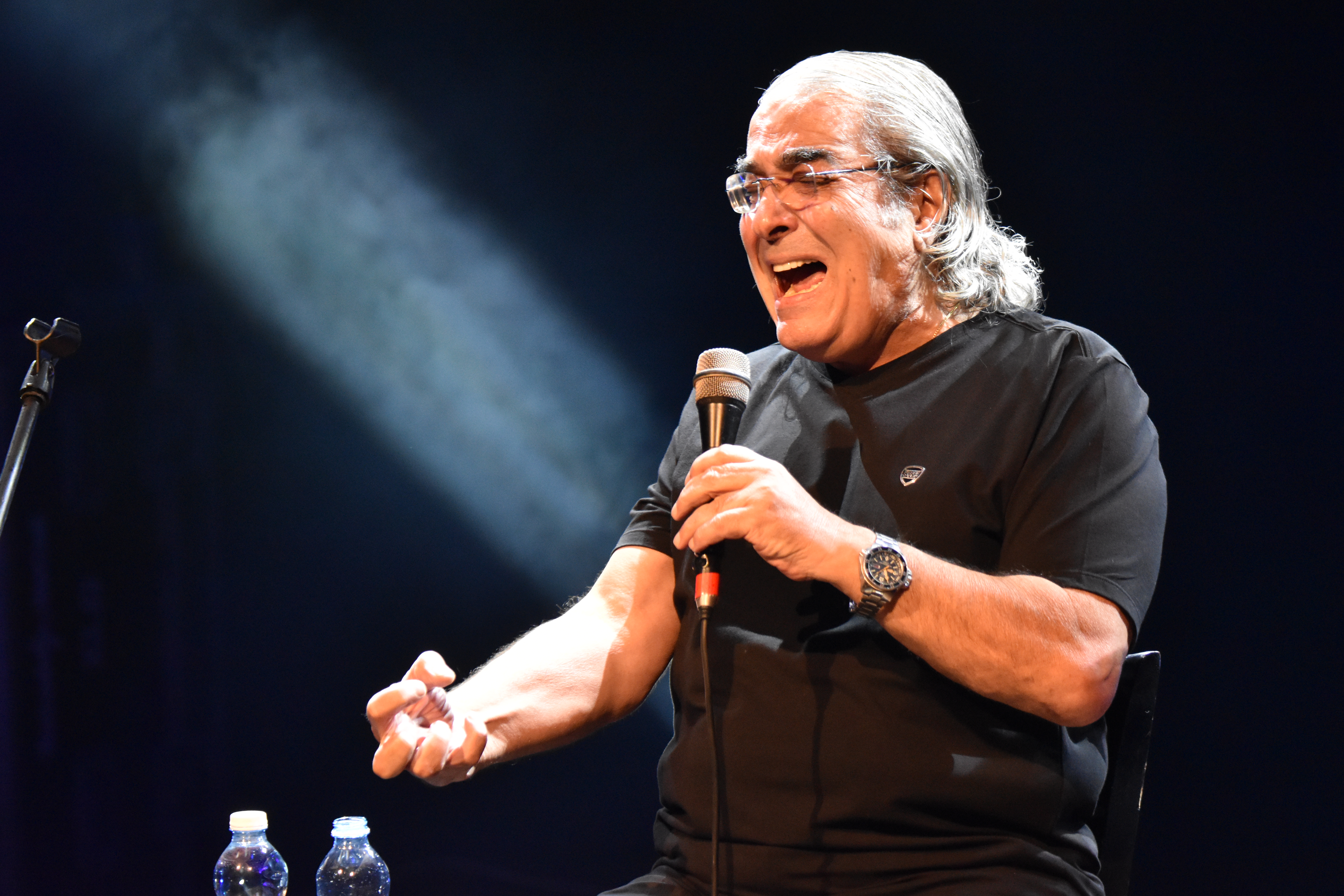 בועז שרעבי, פסטיבל הפסנתר, 2018